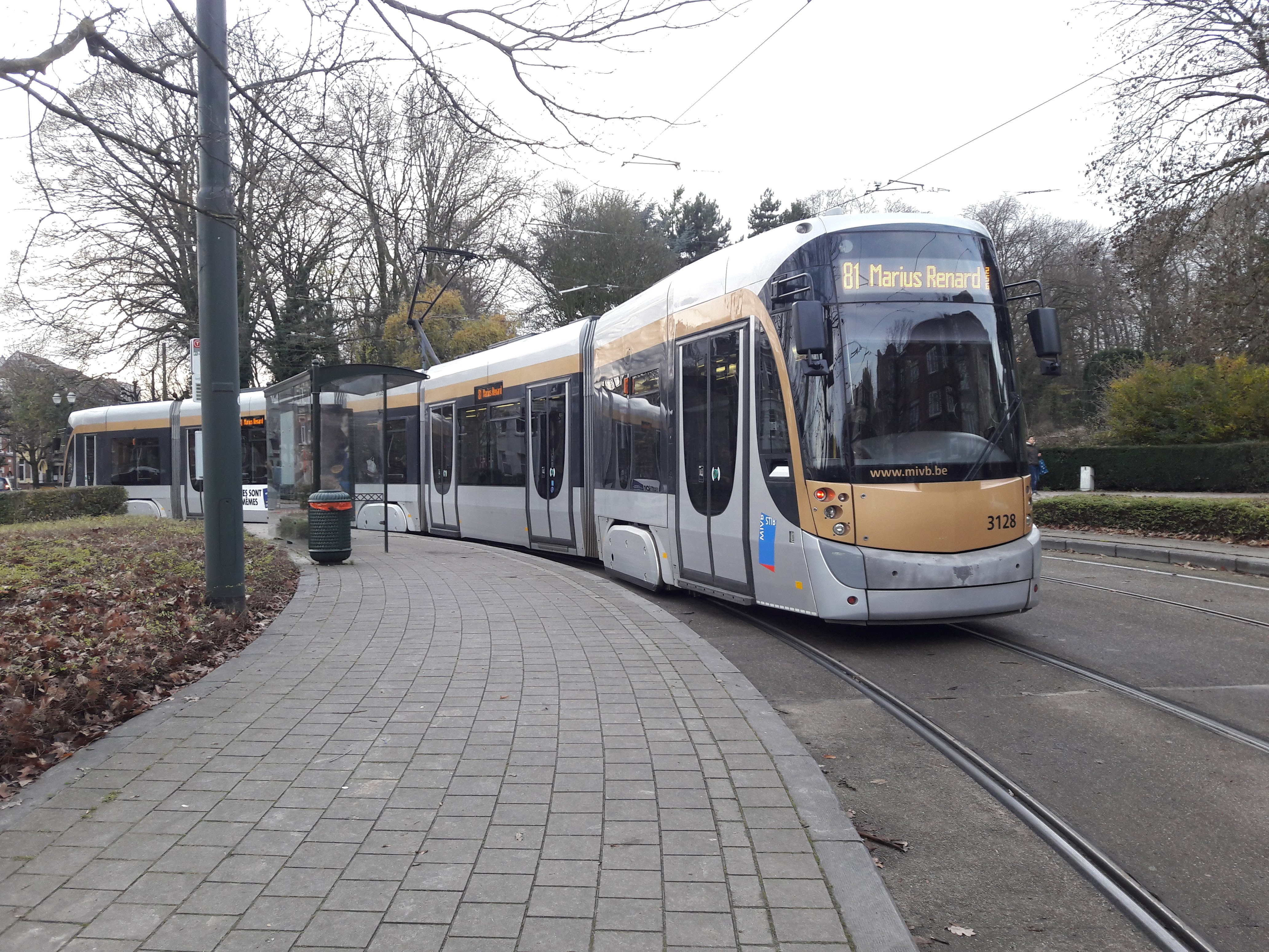 T3000 quittant l'arrêt Meir.